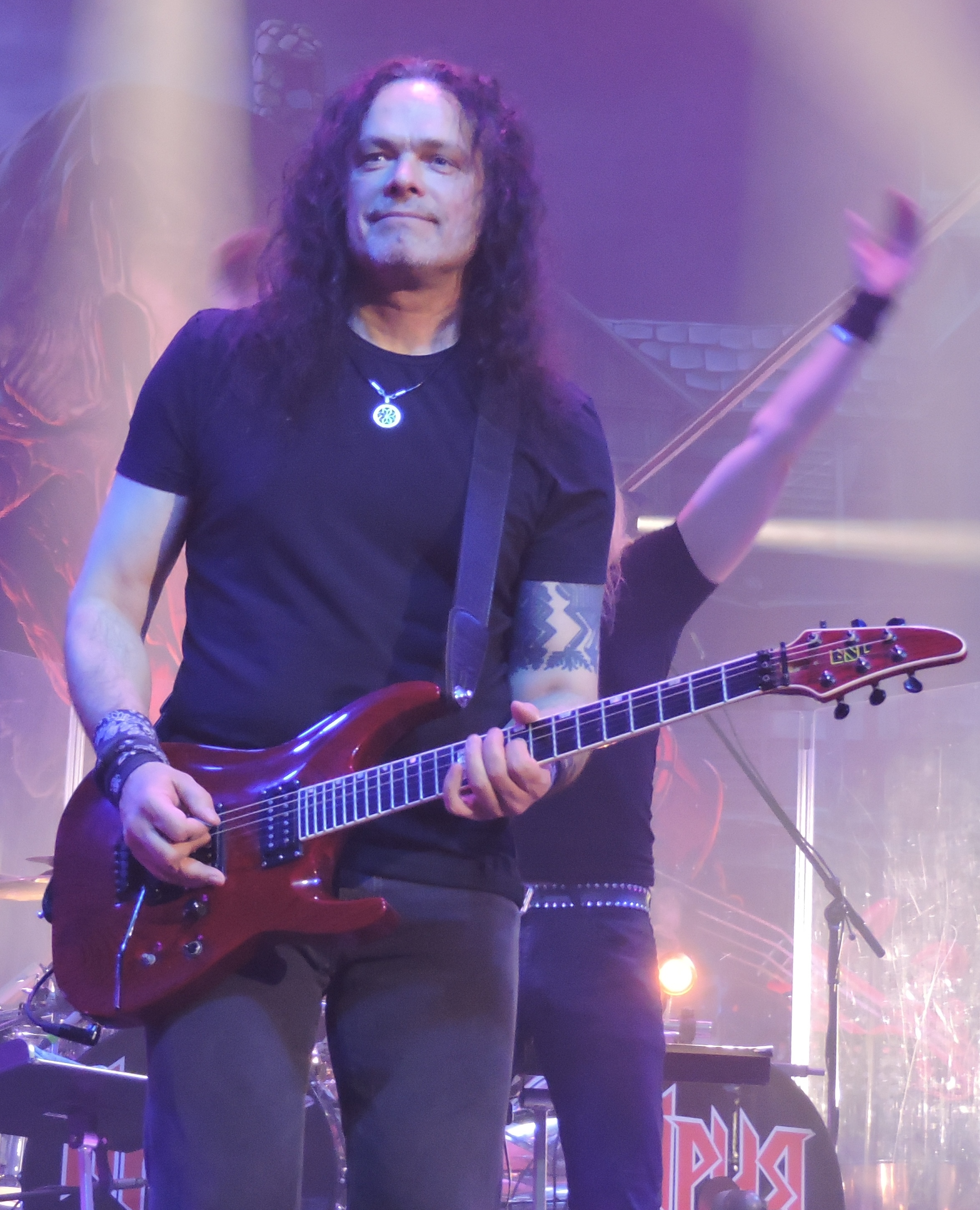 Сергей Попов